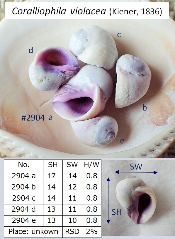 2020年購入品で産地は不明。皿はベンケイガイ。